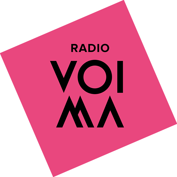 Radio Voima